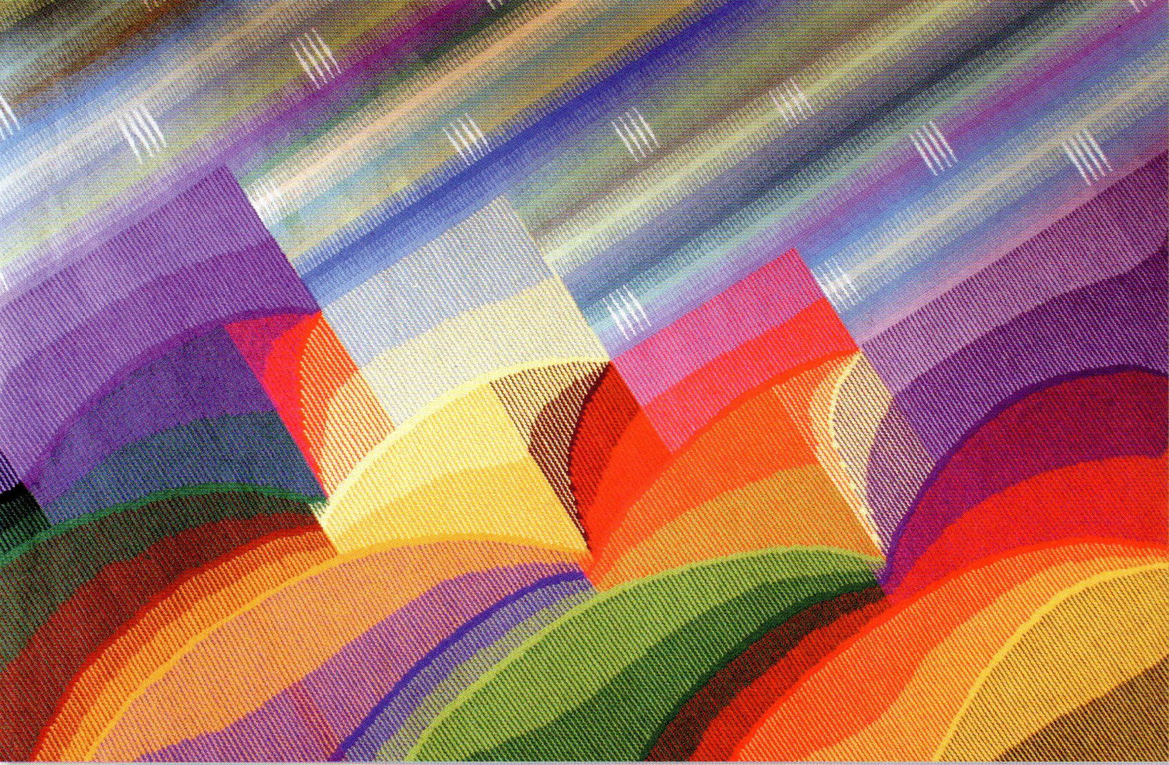 "Corinti", tapís, 200x300 cm., Carles Delclaux, 2007